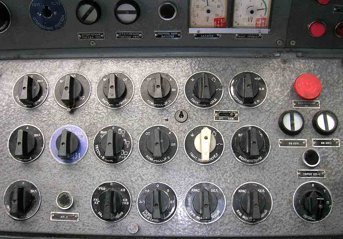 Средний пульт электровоза ЧС7. В правой части пульта – красная кнопка отключения БВ и блинкерные сигнализаторы состояния БВ